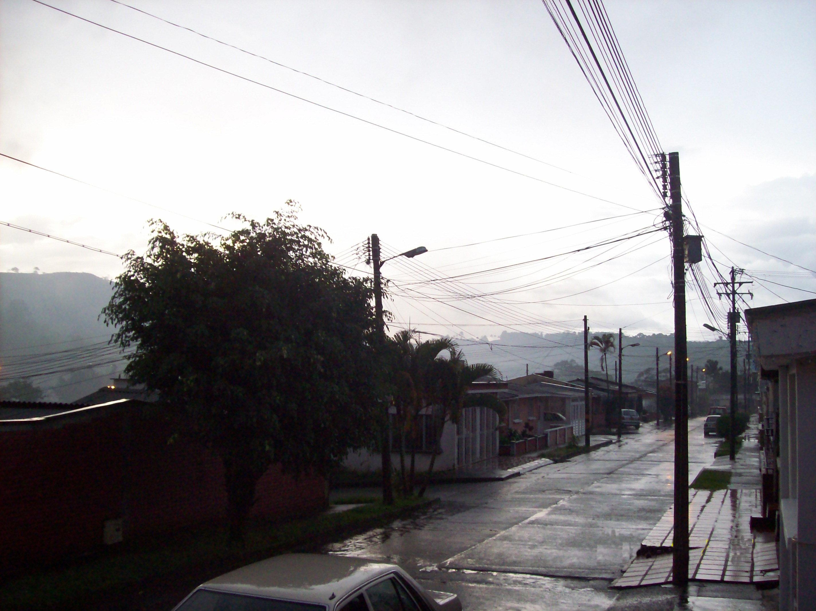 Barrio La Ceiba hacia el occidente en Chinchiná, Caldas, Colombia.